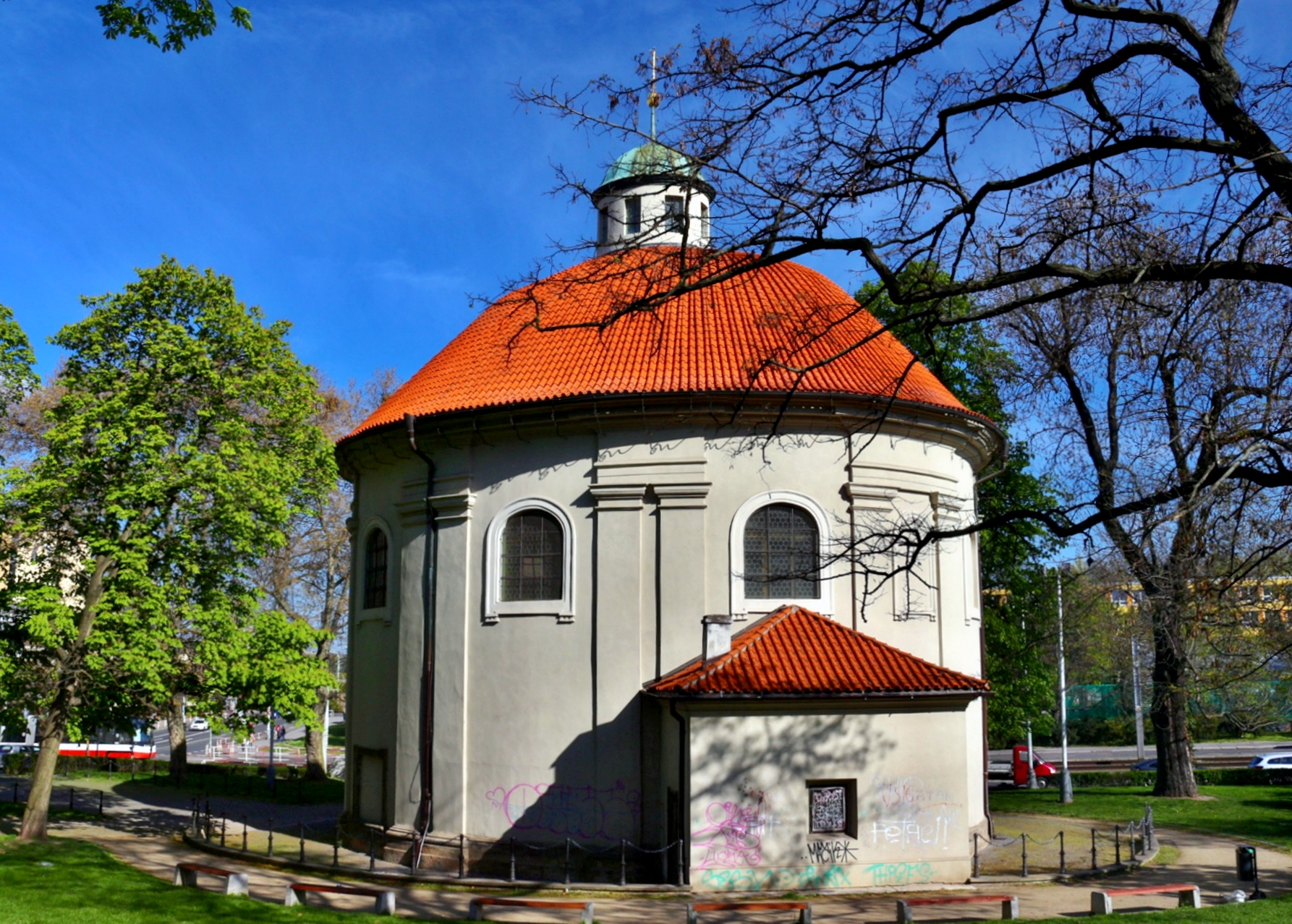 Kostel svatého Rocha, Šebestiána a Rozálie, v Praze 3-Žižkově